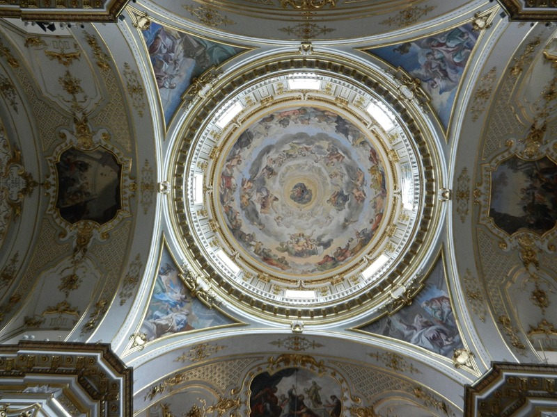 Bergamo - Vista interna della cupola del Duomo